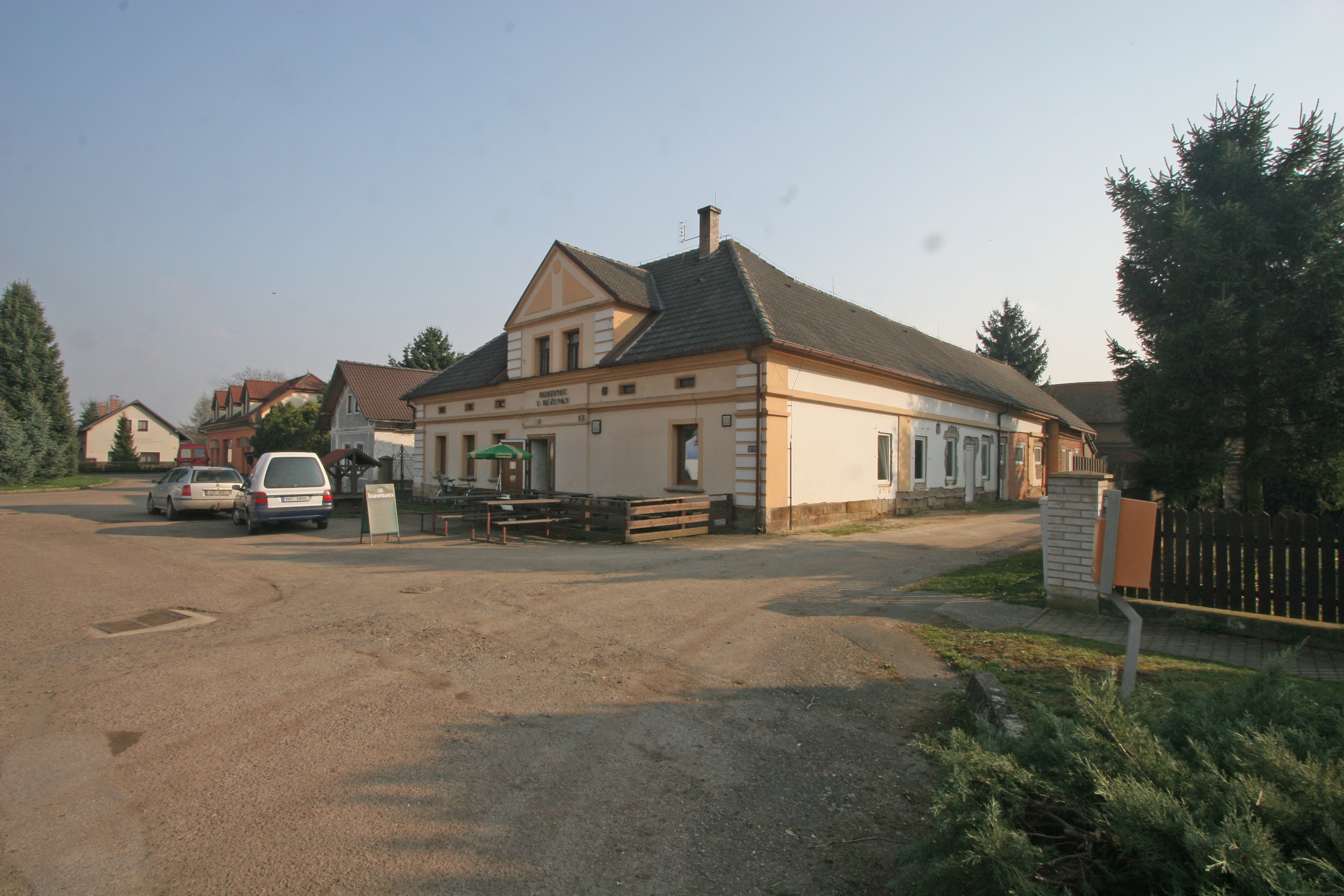 Pšánky hostinec